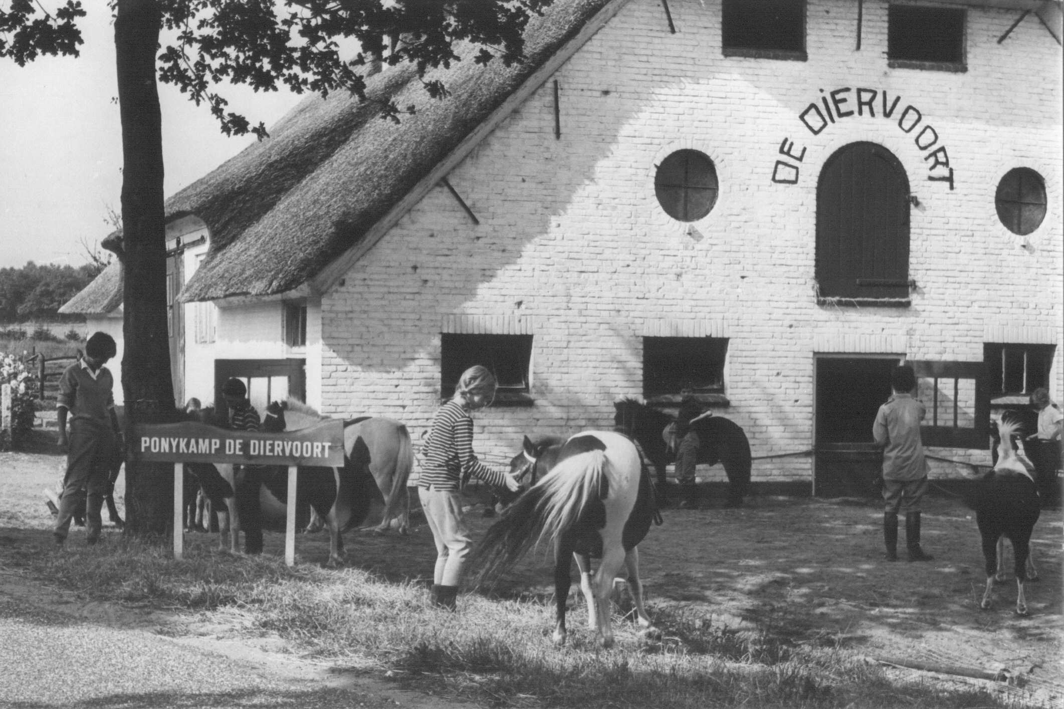 Het ponykamp "de Diervoort"